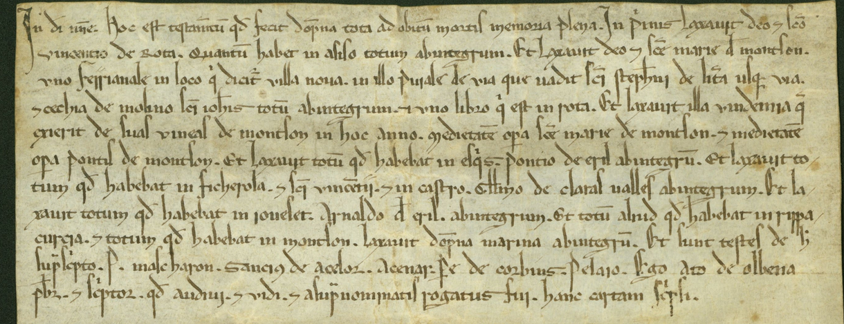 Pergamí que conté el testament de Toda de Castarllenes ca. 1165, prové de l'Arxiu del Capítol de la Catedra d'Osca.